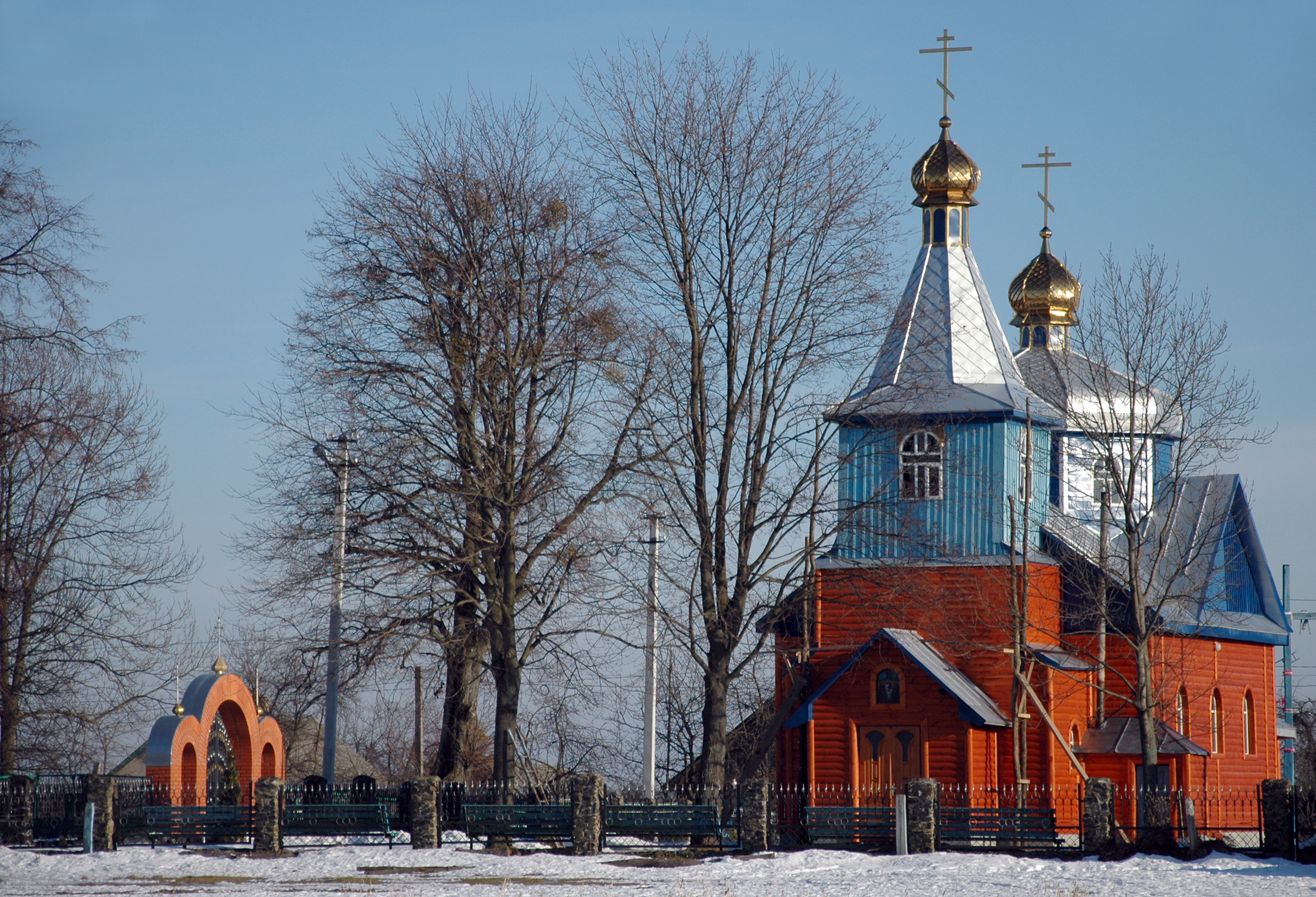 Волинська обл., Камінь - Каширський район. с. Тоболи.